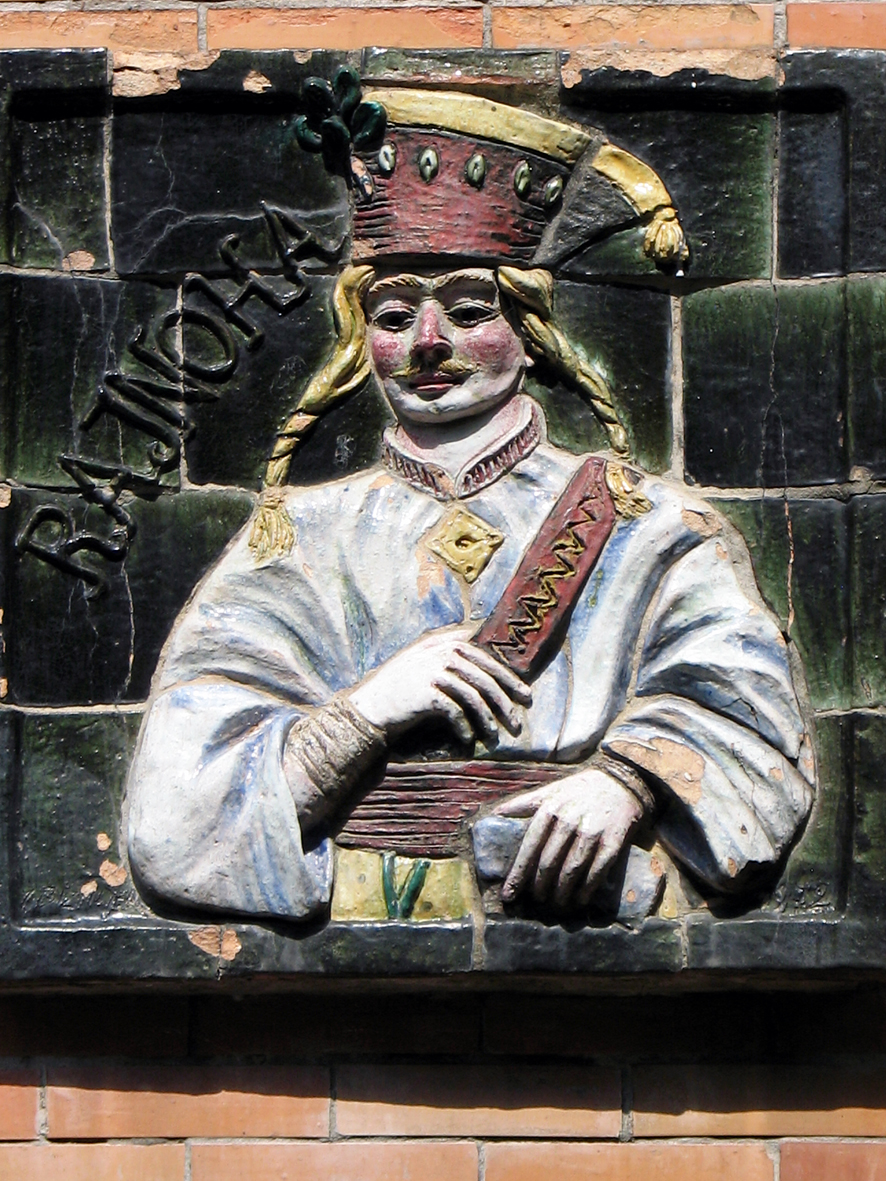 Keramický reliéf národného umelca Ignáca Bizmayera na budove Detského mestečka v Zlatovciach - Trenčíne